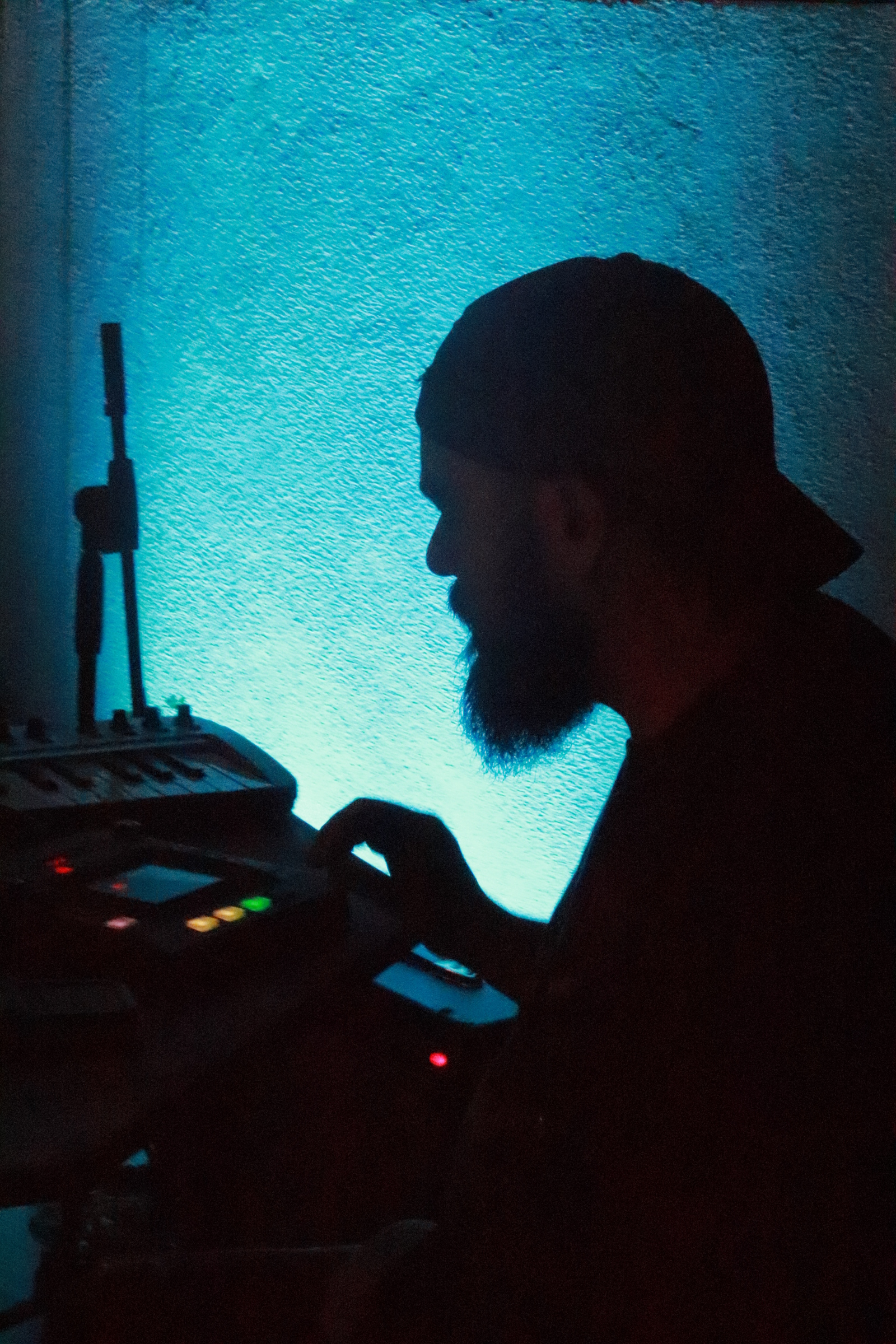 DJ tocando en una fiesta en Querétaro, México